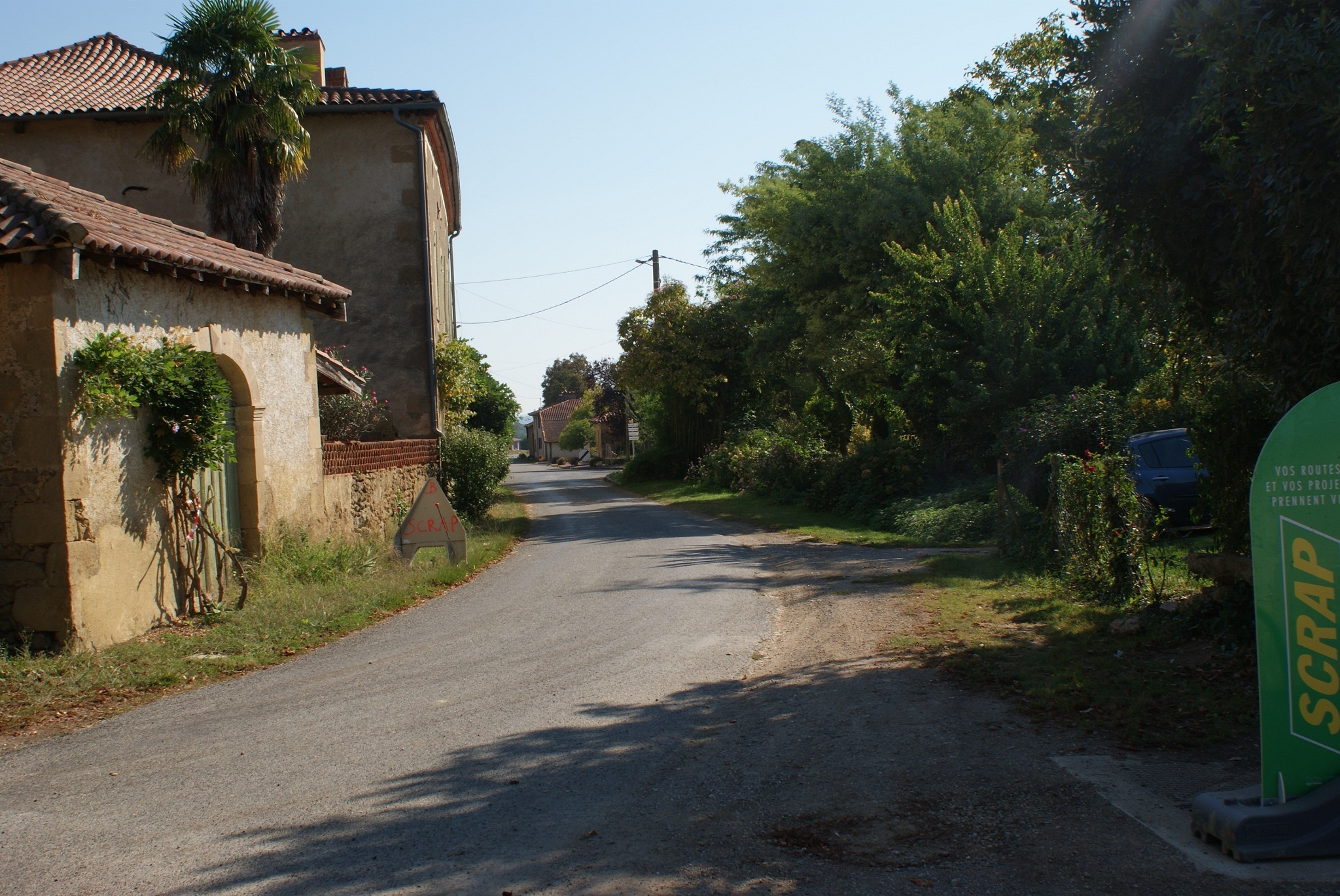 Straat in Lalanne-Arque.